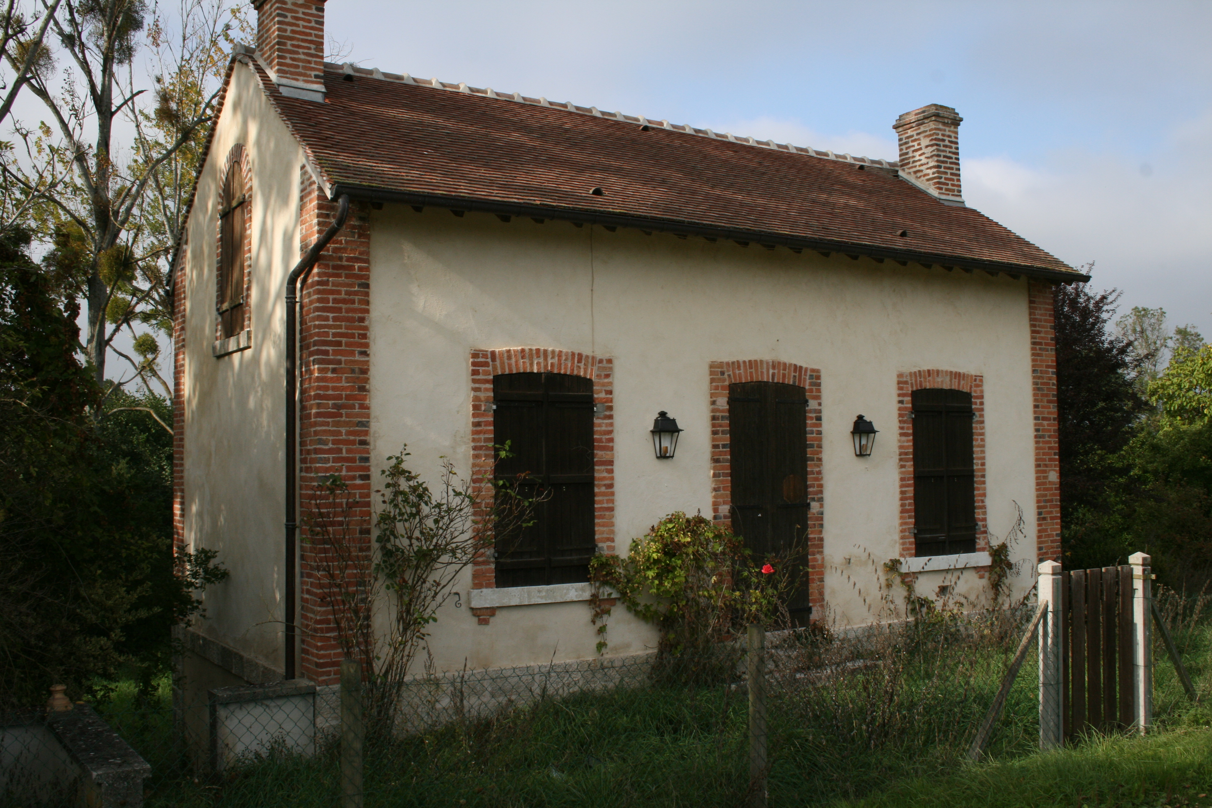 Canal d’Orléans. Maison éclusière du Hateau.